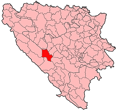 Prikaz općine Kupres u Bosni i Hercegovini